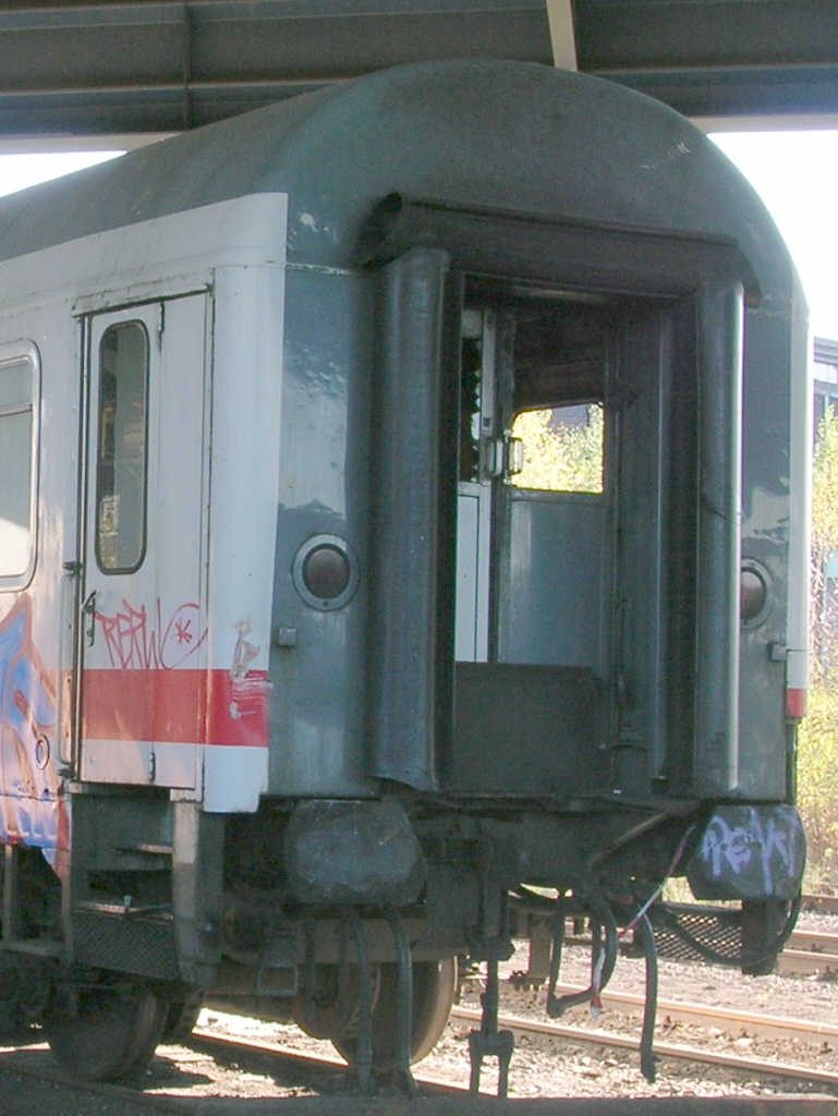 Gummiwulst Wagenübergang Deutsche Bahn Dortmund-Hafen